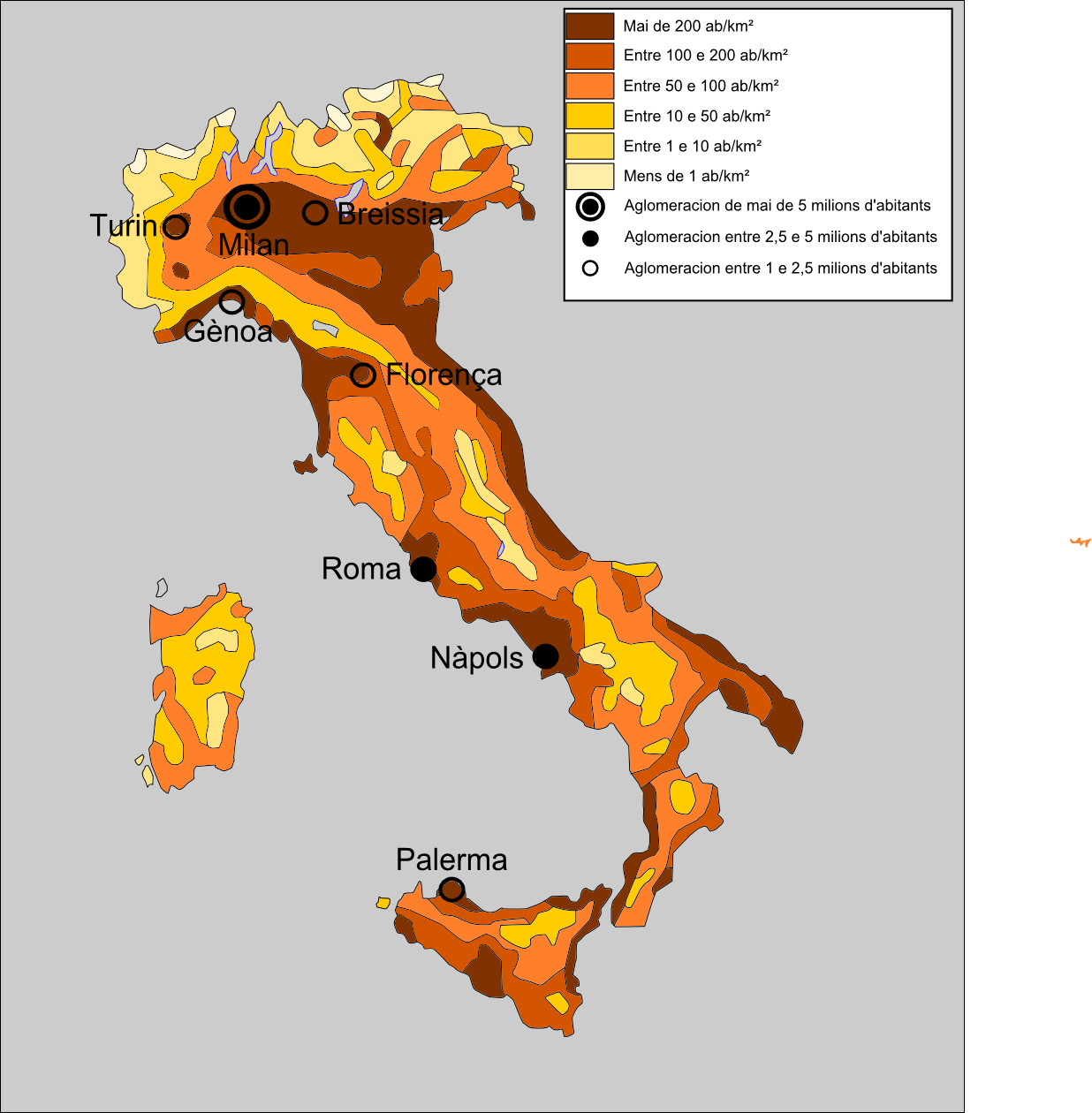 Demografia d'Itàlia.